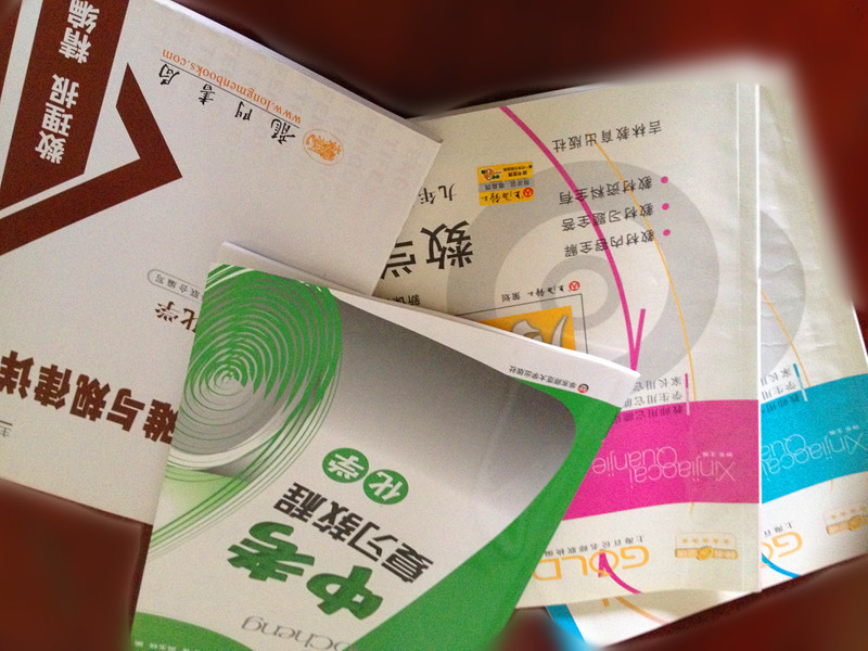 中国上海中考复习教辅